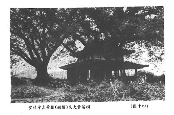 峨眉山老照片